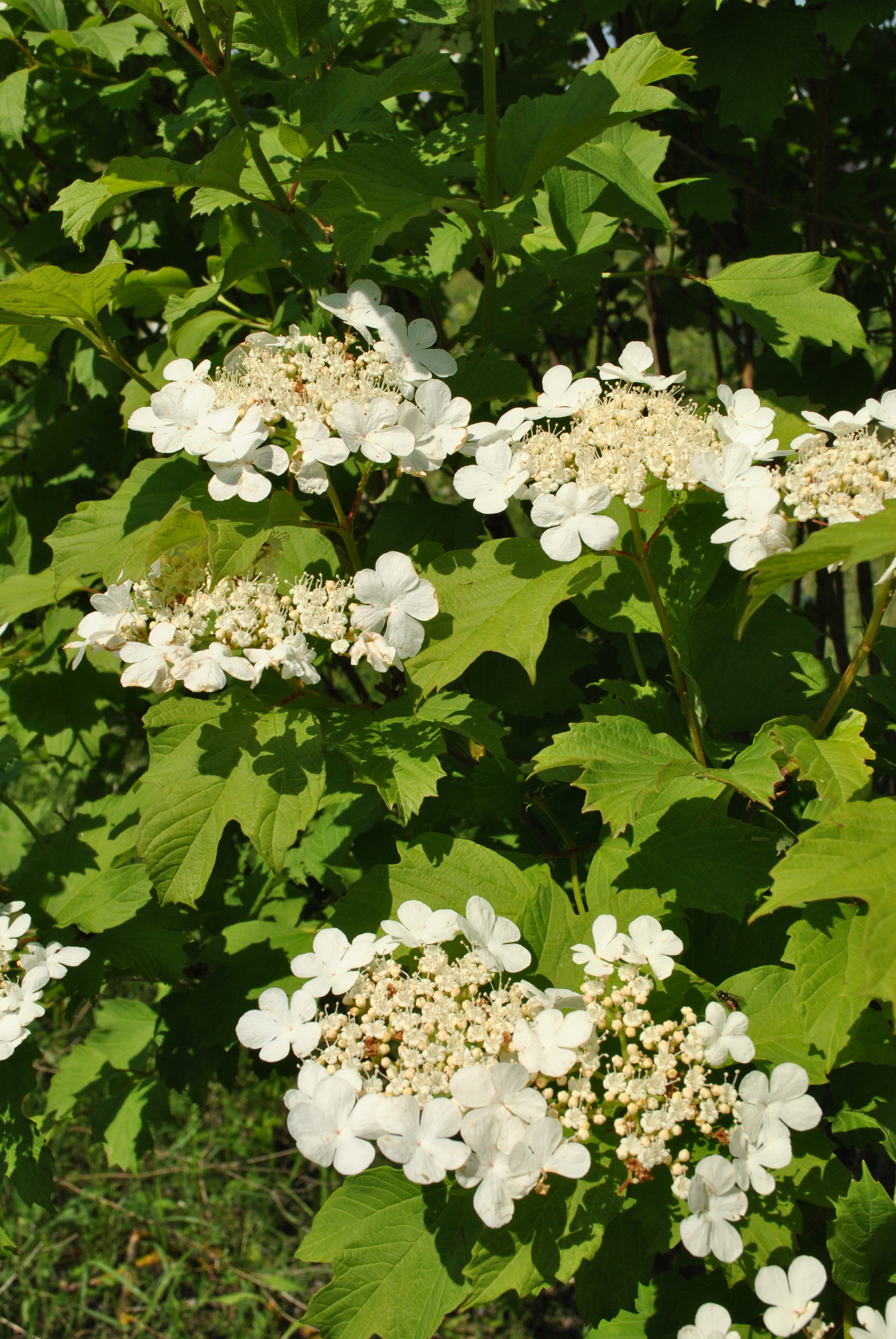 «Галицький ботсад лікарських рослин» Тернопільського медичного університету між селами Драганівка і Підгородне Тернопільського району Тернопільської області України. Калина звичайна.